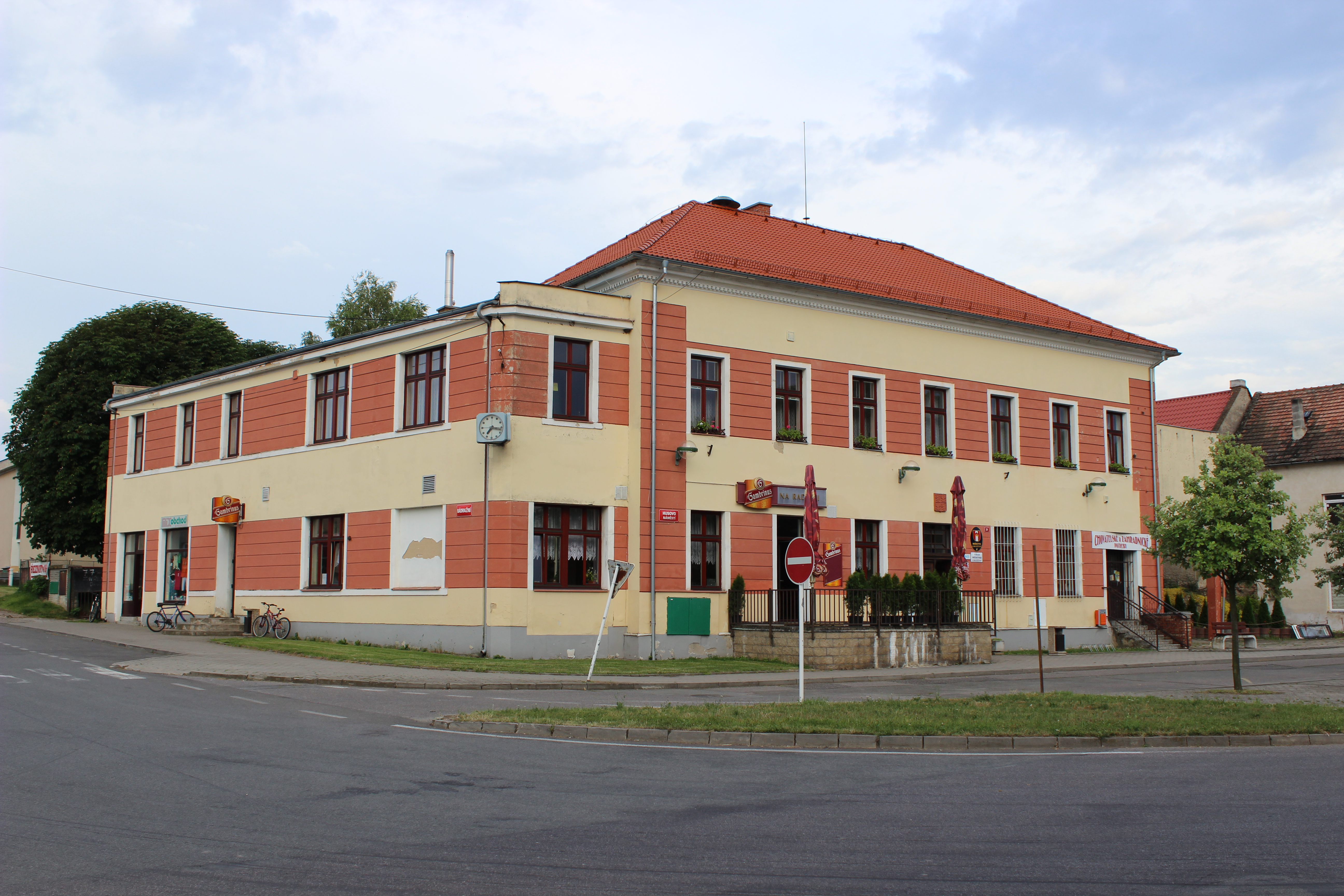 Obecní úřad v Chotětově v mladoboleslavském okrese.